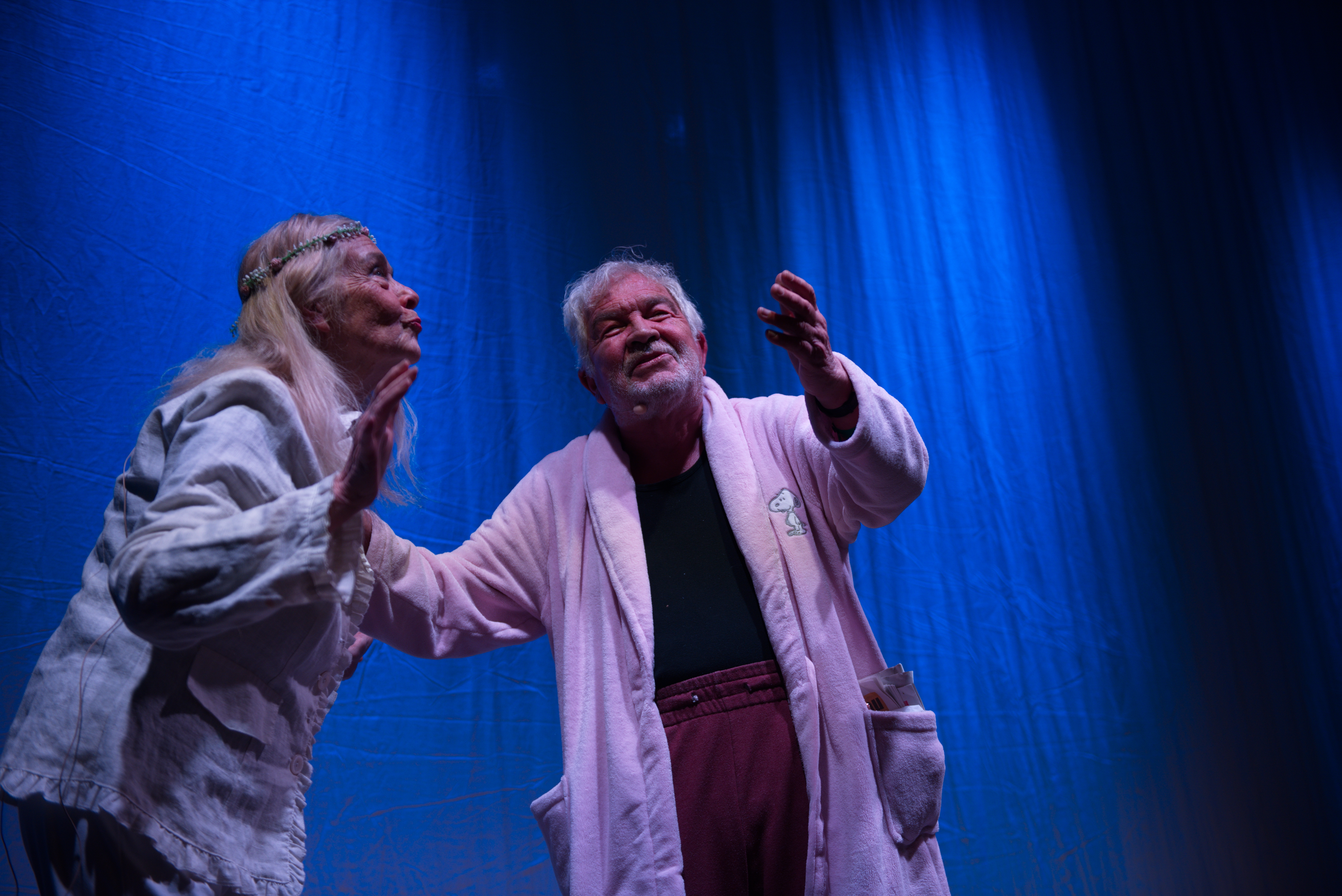 Lore Duwe und Claus Wilcke mit einer kleinen Theater Performance auf der Veranstaltung Wuppertal hilft 2016